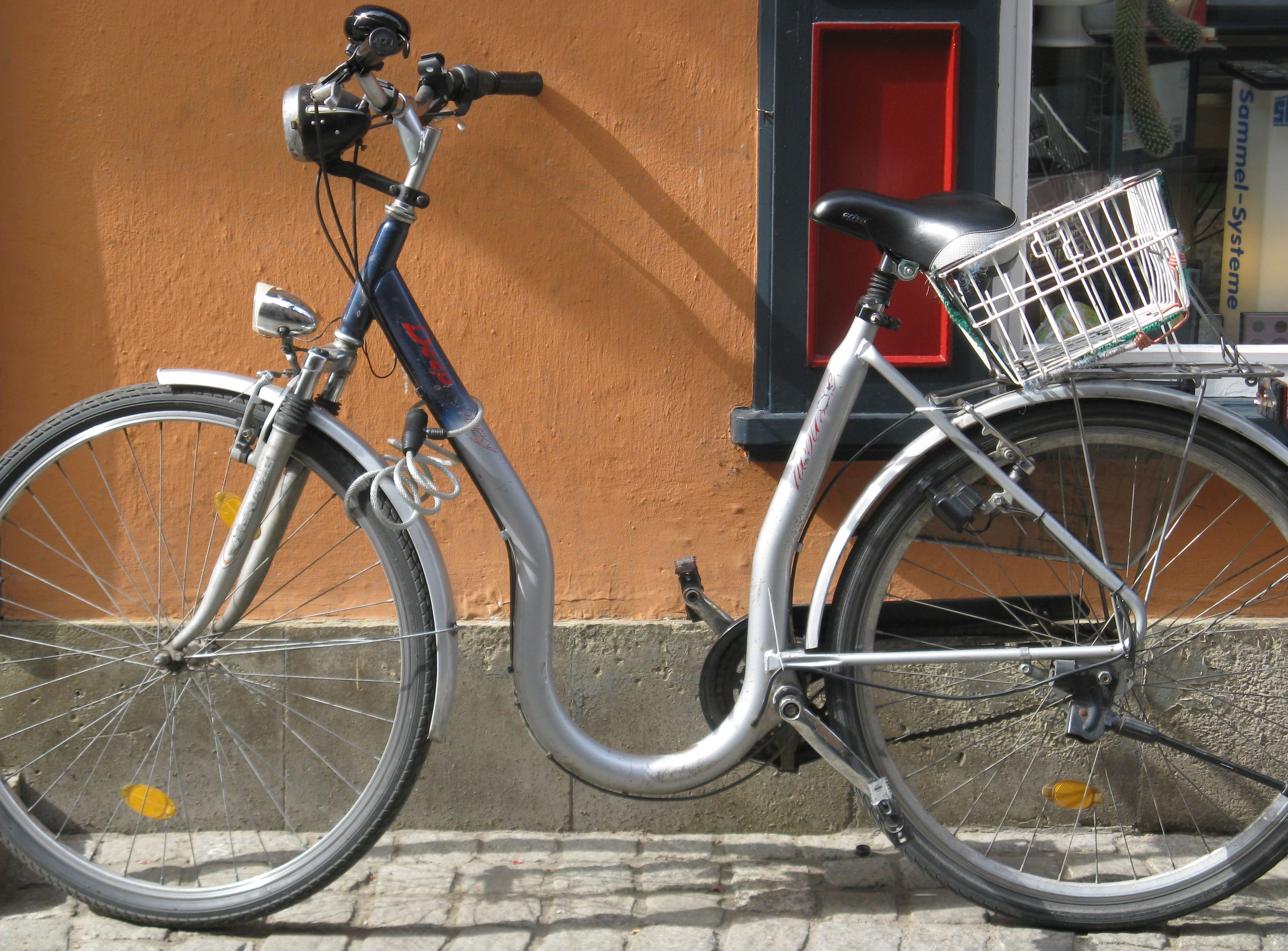 Tiefdurchstieg-Fahrrad